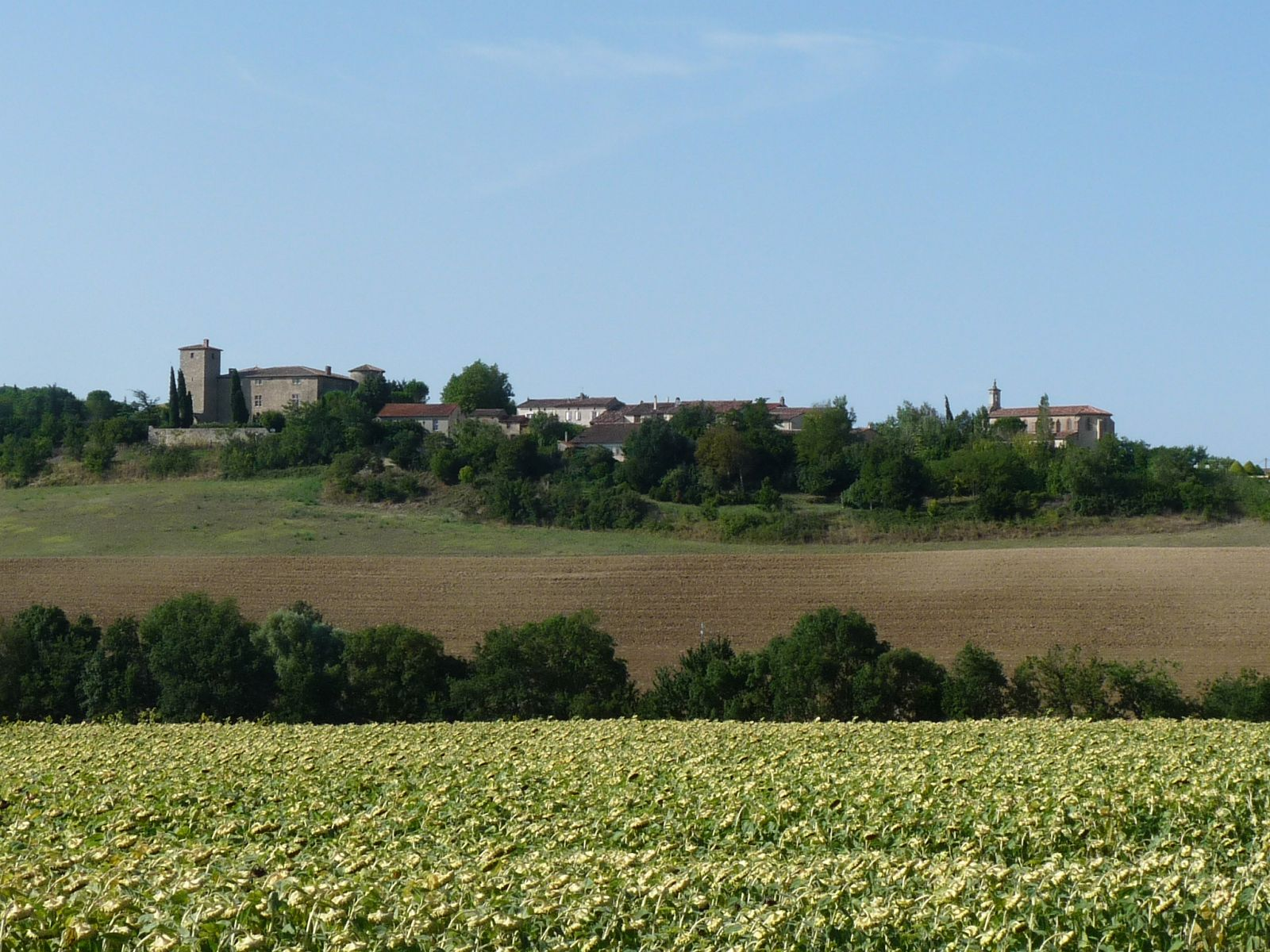 Vue du village de Juzes depuis Lux, Haute-Garonne, France